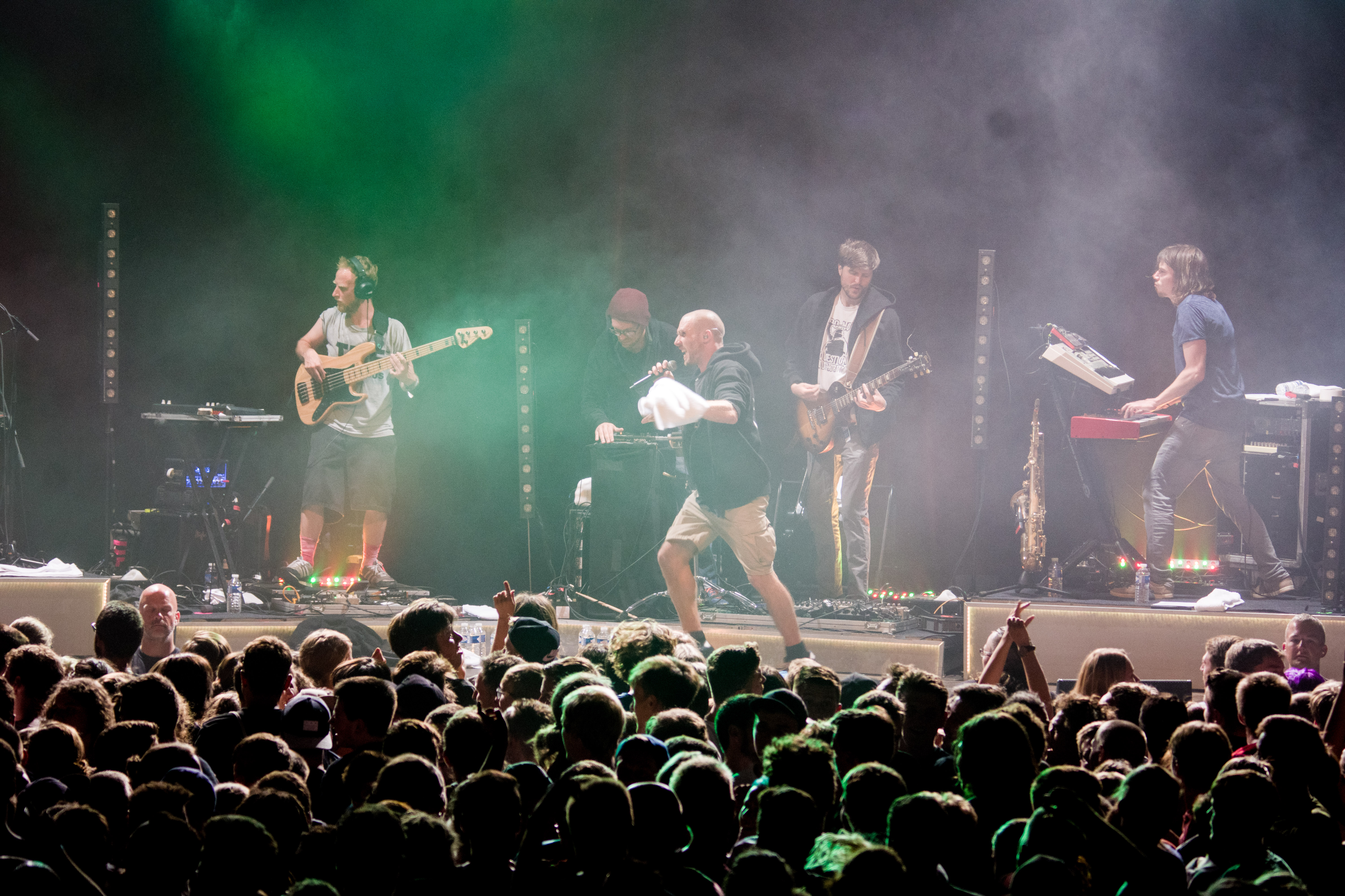 Das Zelt-Musik-Festival 2017 in Freiburg im Breisgau 15.07.2017 Irie Révolté